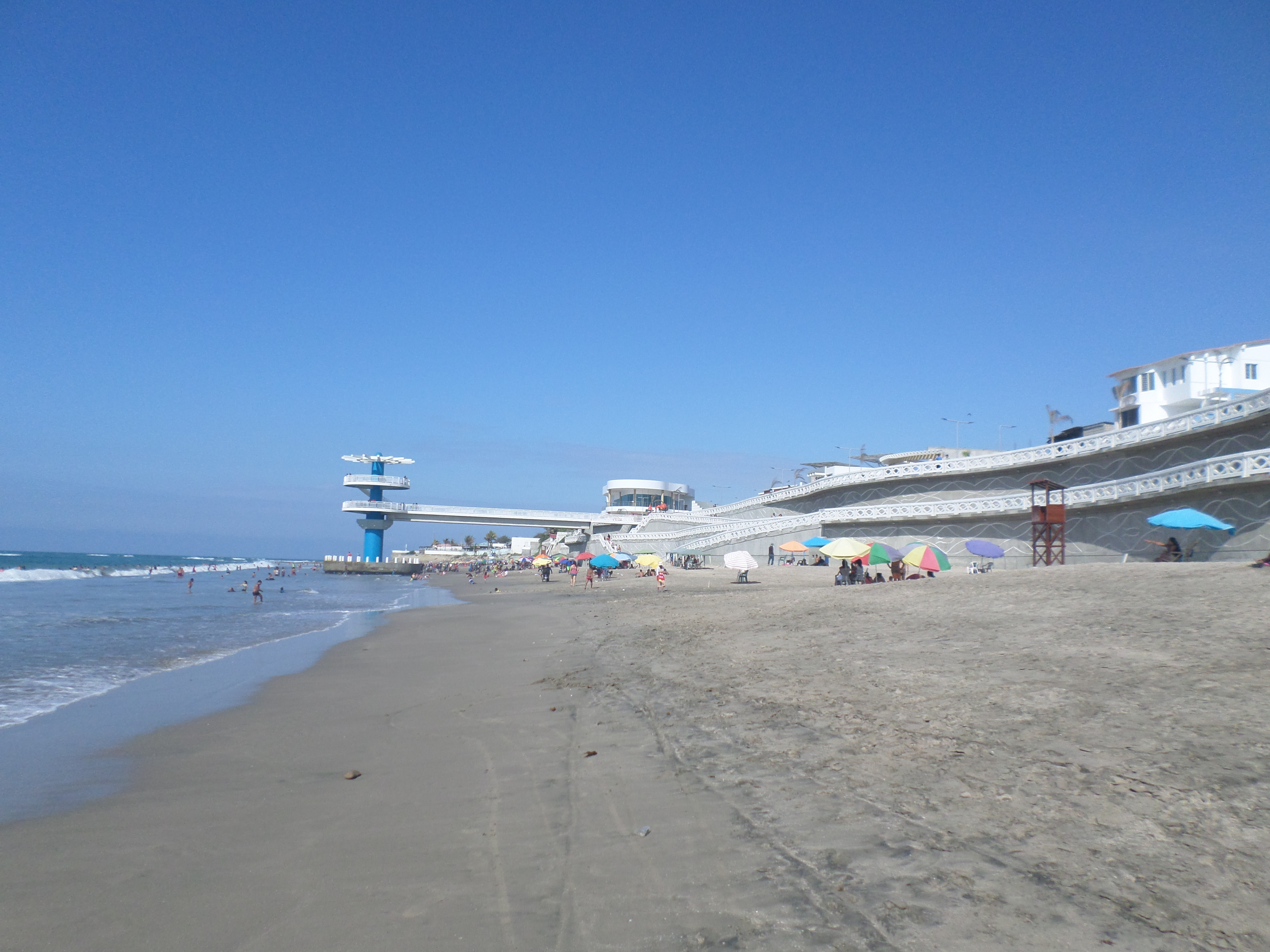 Vista del malecón de Ballenita